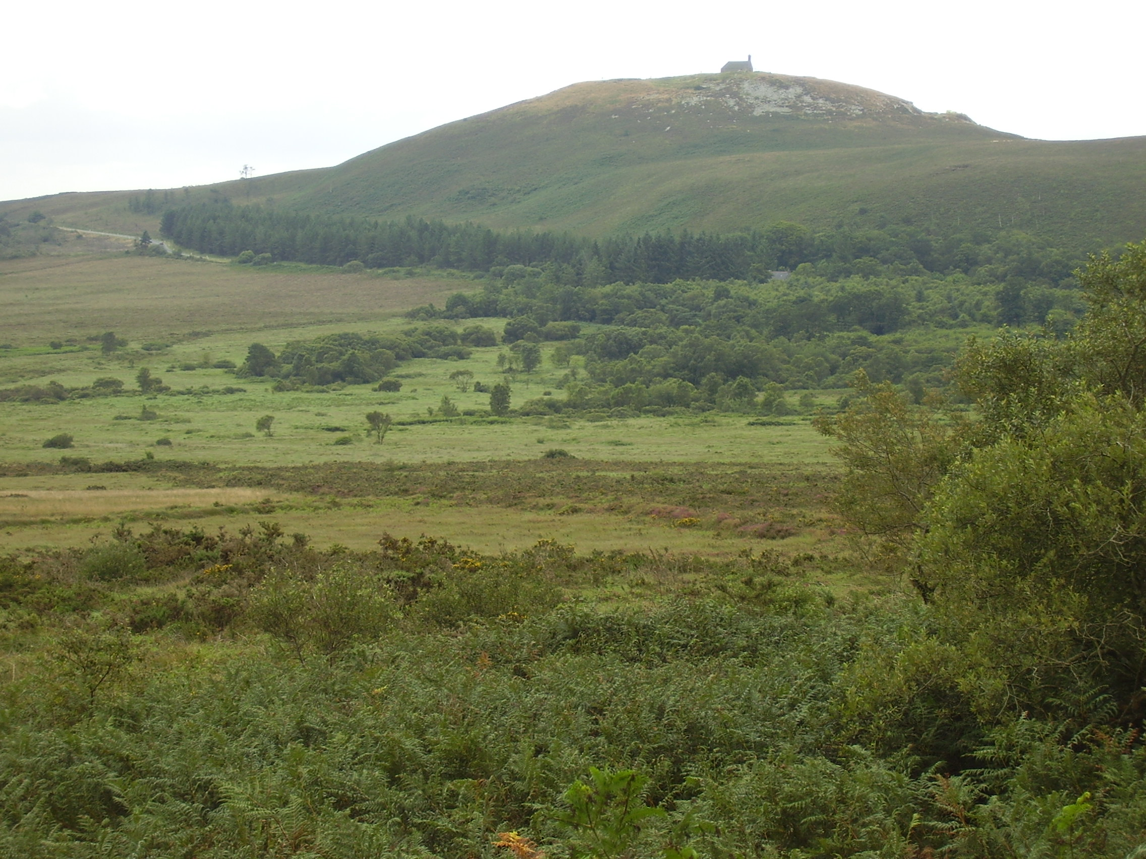 Plounéour-Ménez, Roc'h Trevezel, Bretagne; Frankreich